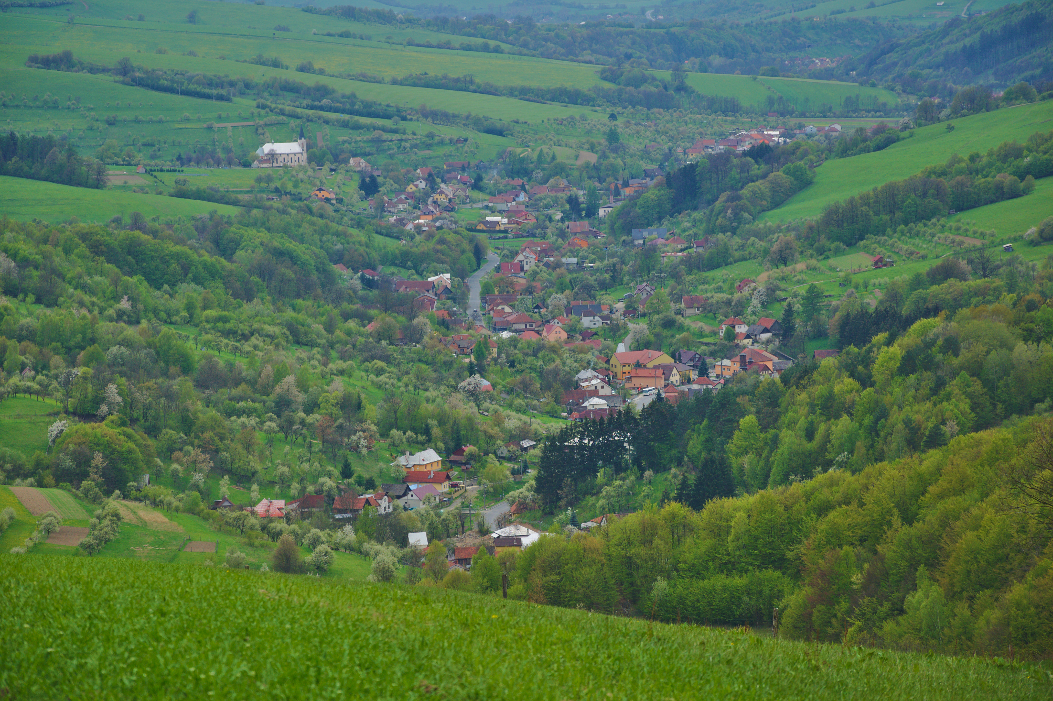 Pohled na vesnici od vrcholu Pasecké lazy, Nedašova Lhota, okres Zlín